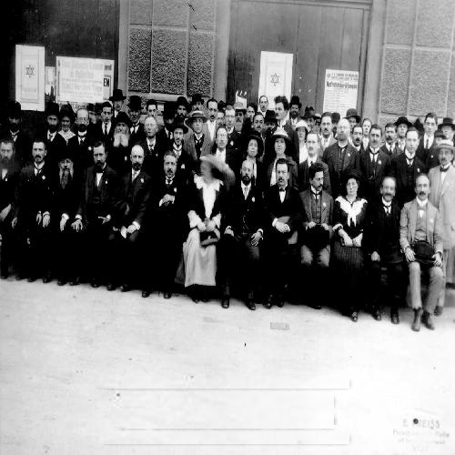 הקונגרס הציוני האחד עשר בוינה 1913, קבוצת משתתפים, בסמוך לבניין המוזיקפראיין. שורה ראשונה ( מימין לשמאל): (1) יעקב נכט, (2) שלמה שילר, (4) מ. רינזלר, (5) אדולף שטנד, (6) יהושע טהון. שורה שניה (משמאל לימין): (3) אגון מיכאל צוויג.